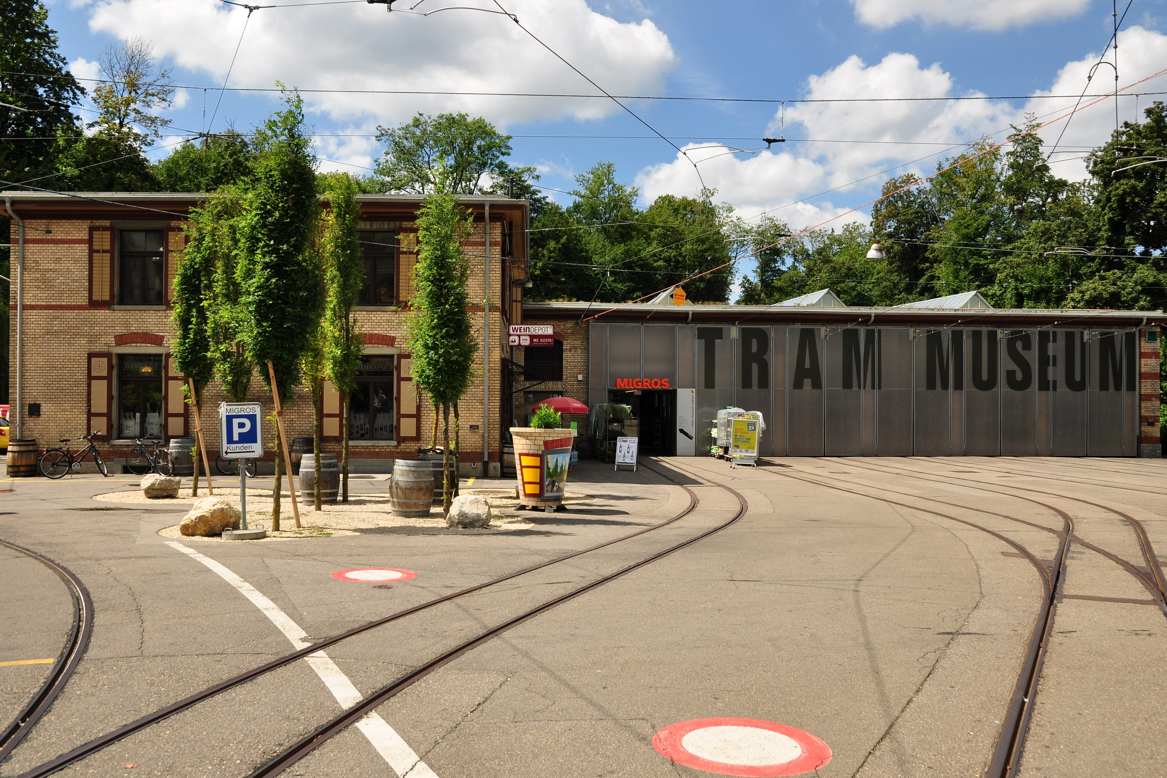 Tramdepot Burgwies in Zürich-Weinegg (Switzerland)